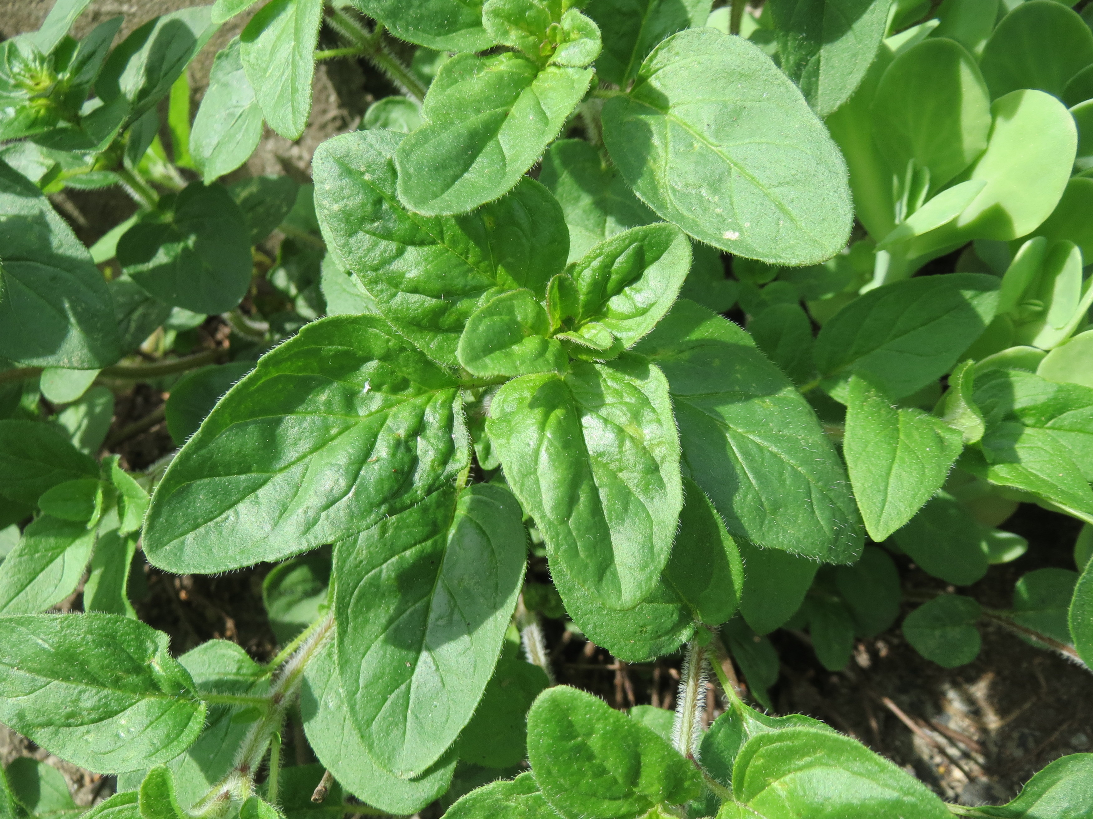 Oregano (Origanum vulgare) in Hockenheim